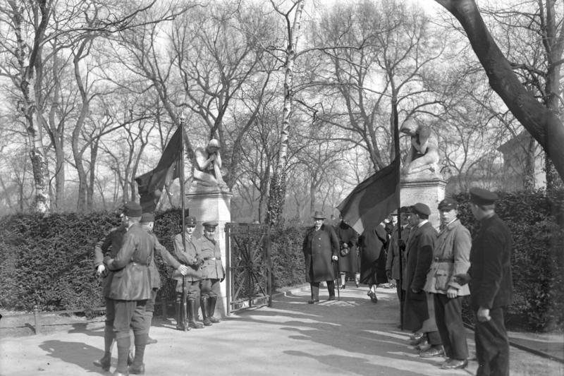 An den Gräbern der Märzgefallenen im Friedrichshain in Berlin ! Ehrenwache des Reichsbanners vor dem Eingang zum Friedhof der Märzgefallenen im Friedrichshain in Berlin.